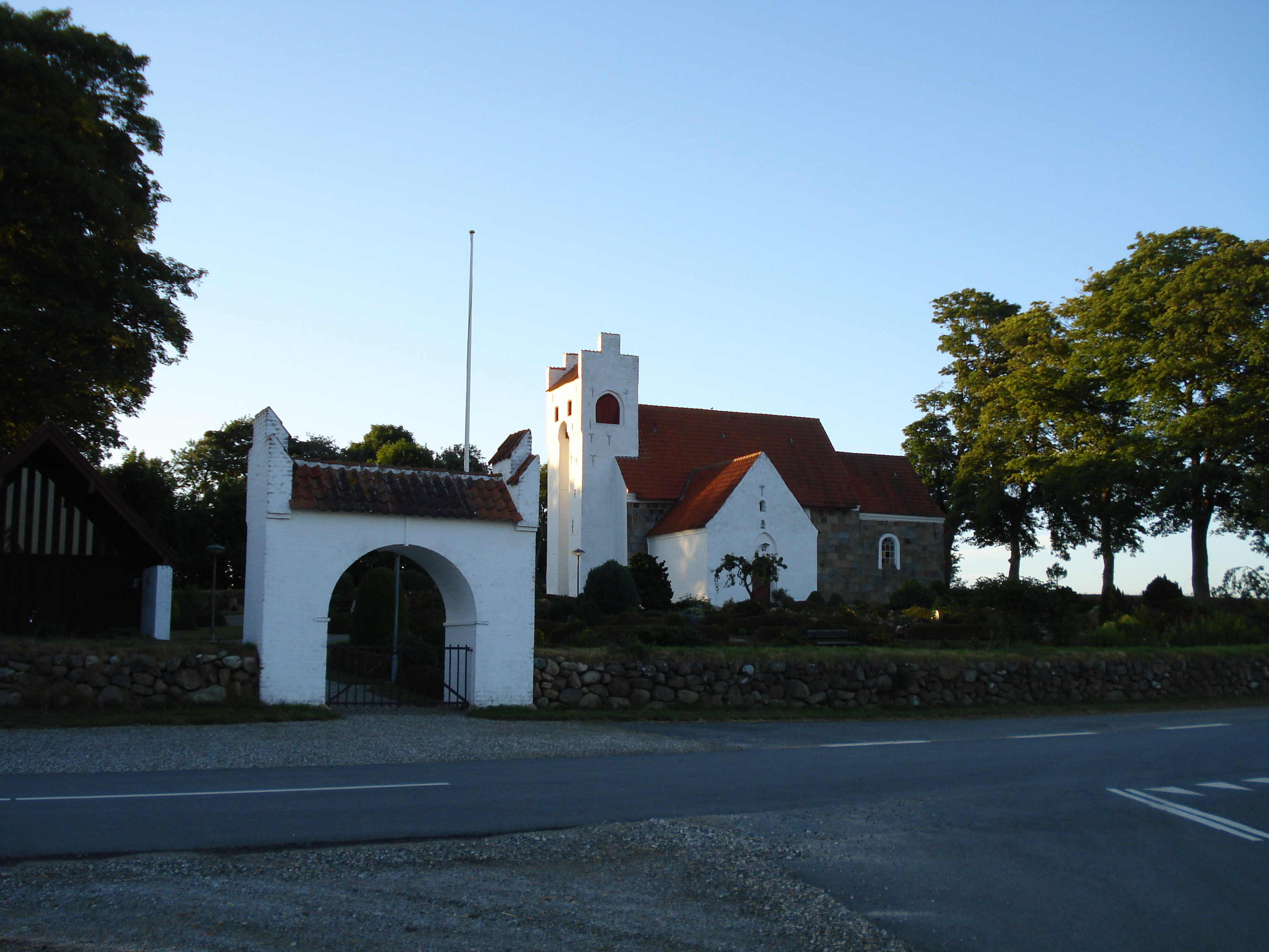 Mesing Kirke (Mesing Church), Jutland, Denmark